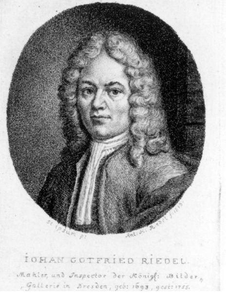 Iohan Gotfried Riedel, Mahler und Inspector der Königl: Bilder=Gallerie in Dresden; 1813 A.H. Riedel, Kupferstichkabinett Dresden